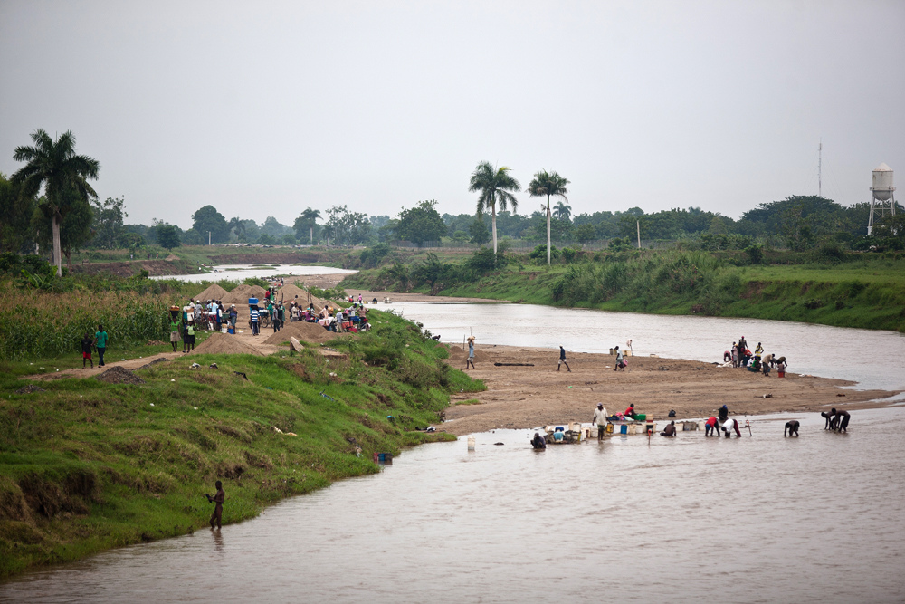 Frontera Dajabón - Ouanaminthe. ©Fran Afonso